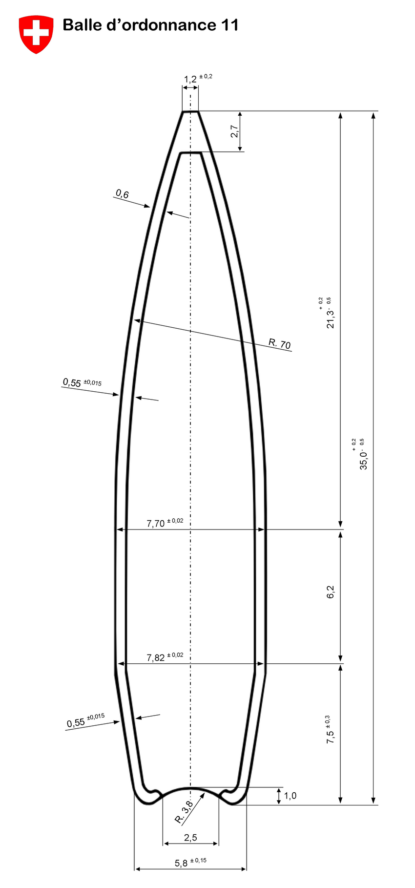 GP 11, balle d'ordonnance 11